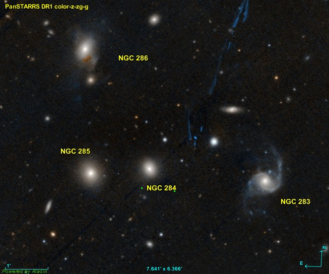 Créée avec Aladin et les données publiques du relevé PanSTARRS